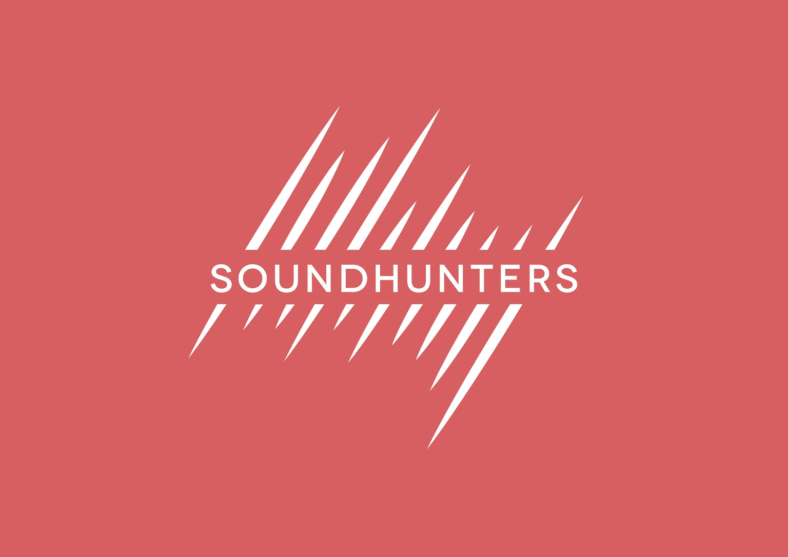 Logo du projet transmedia Soundhunters